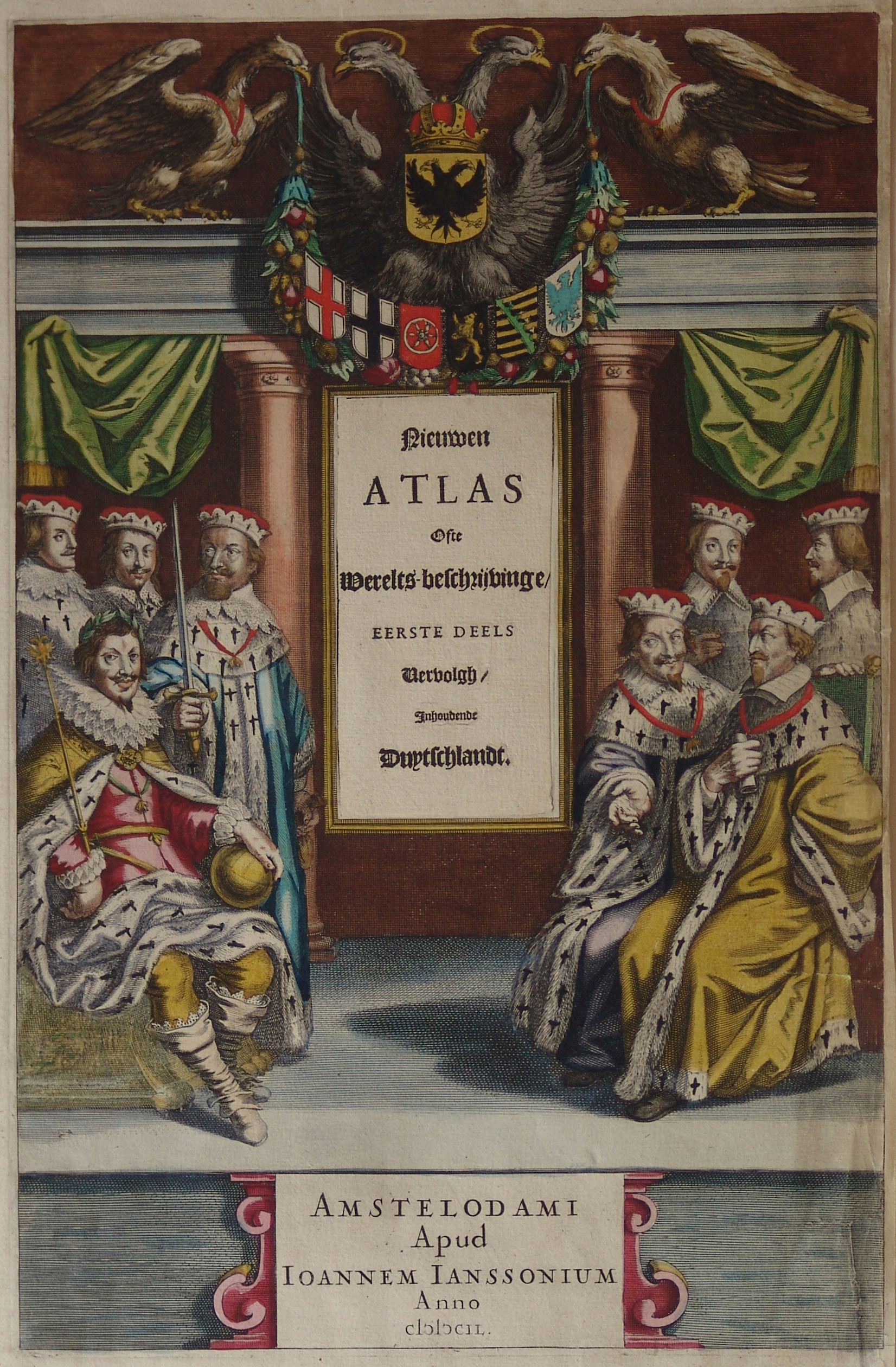 Title page; Nieuwen Atlas Ofte Werelts-beschrijvinge/ eerste deels Vervolgh/ Inhoudende Duytschlandt. Amstelodami Apud Ioannem Ianssonium Anno 1649